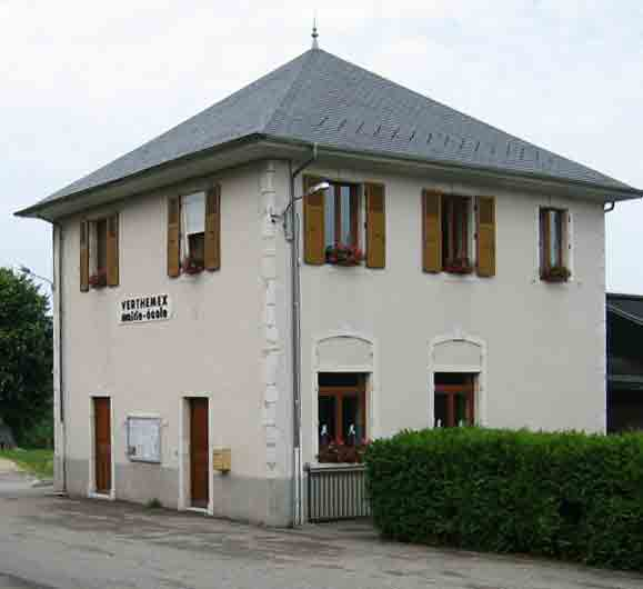 Photo de la mairie de Verthemex